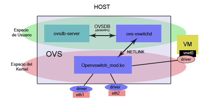 OVS sin Controller